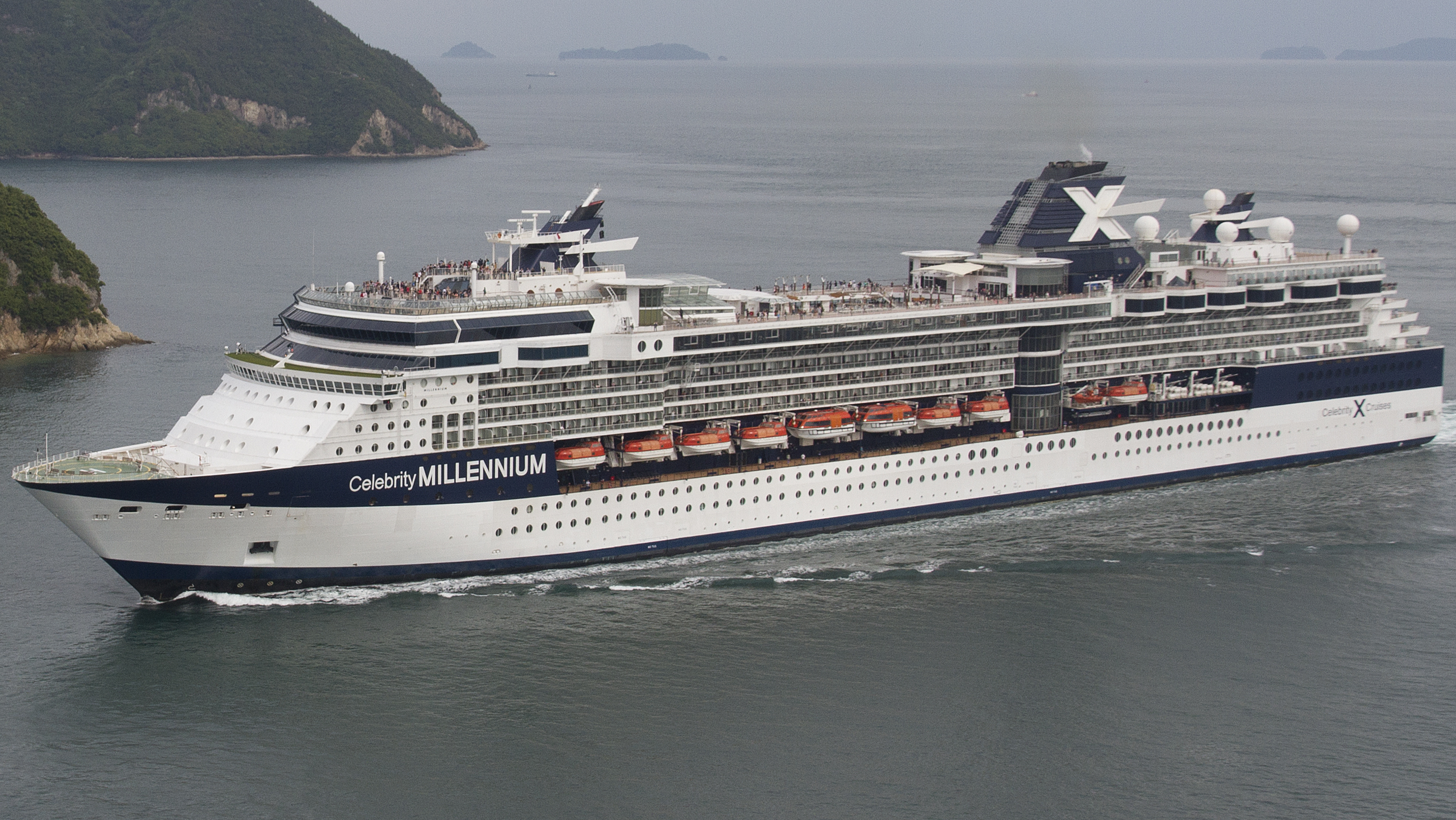 来島海峡中水道を航行するセレブリティ・ミレニアム